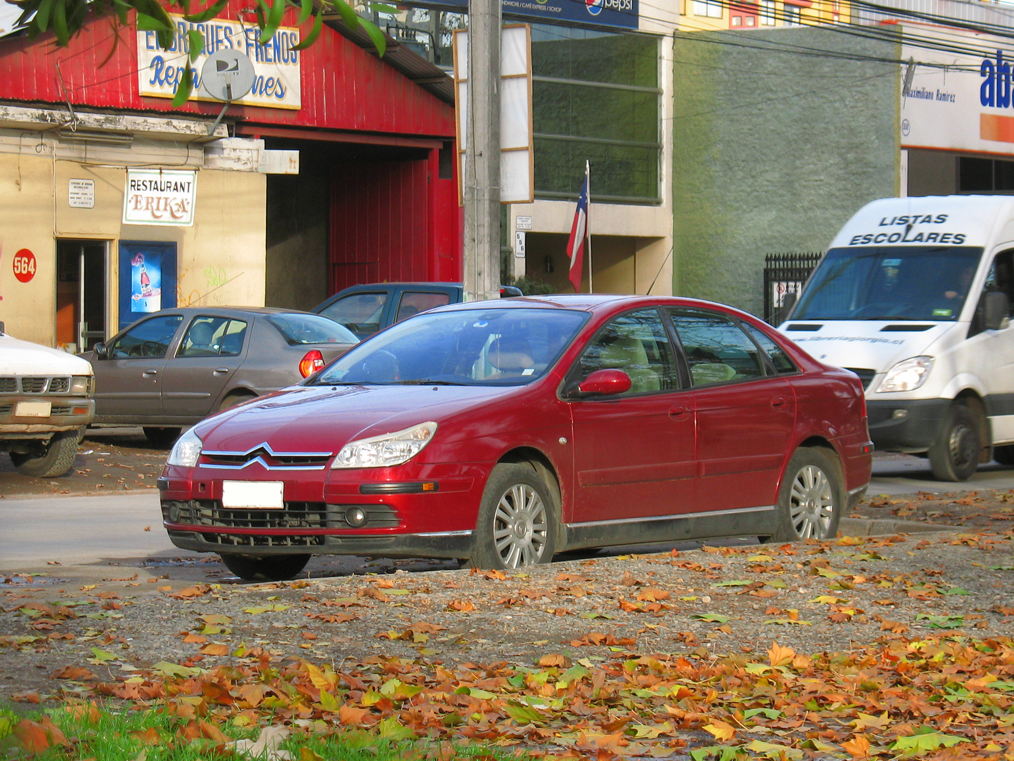 Citroen C5 SX 2005